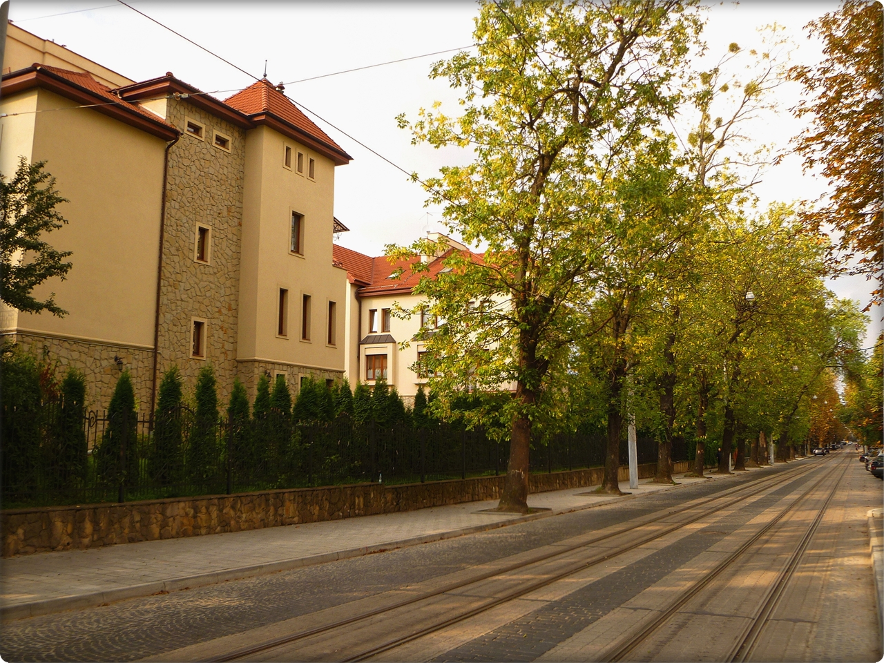 коновальця вулиця